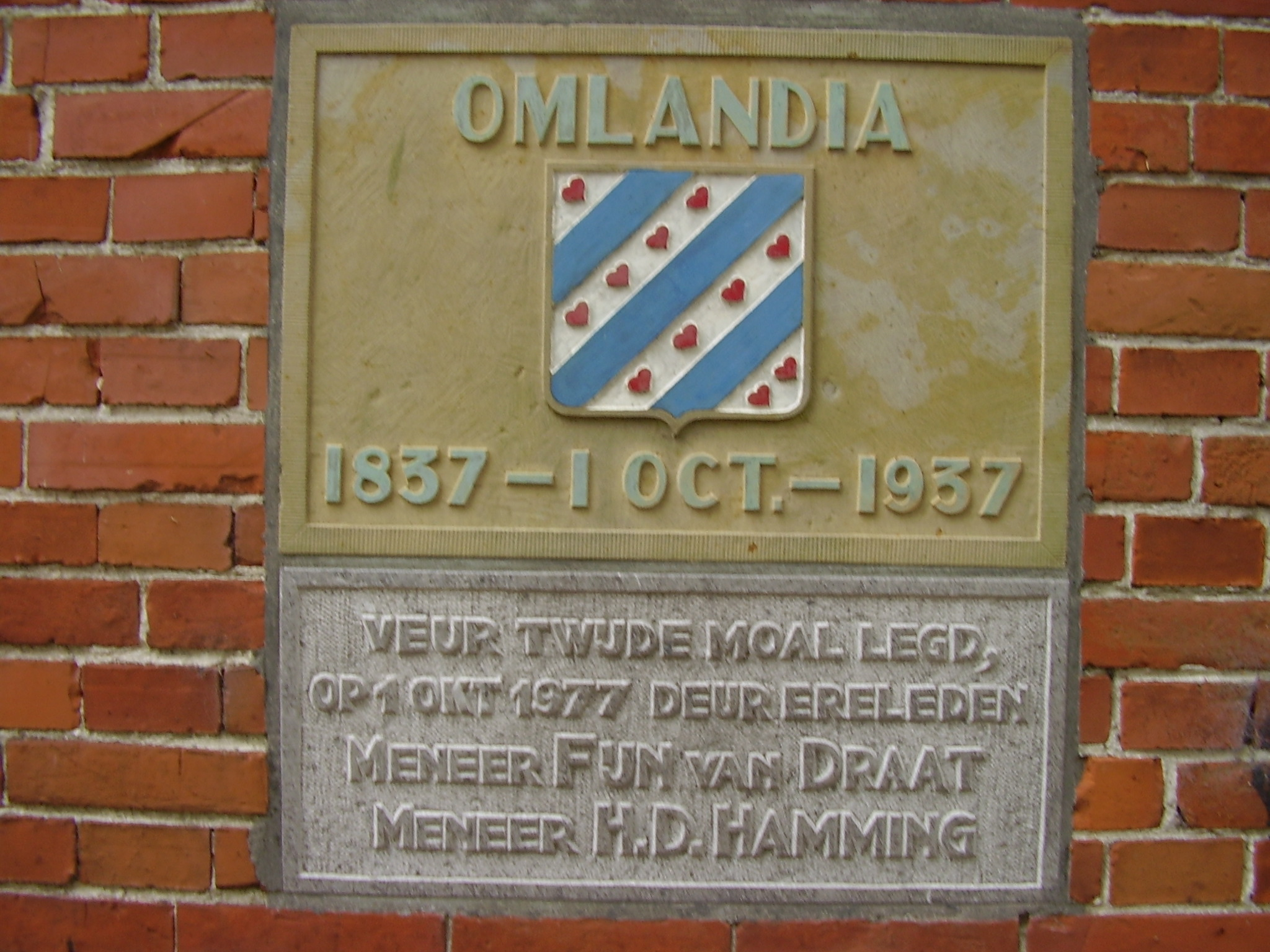 Gedenksteen van het genootschap 'Omlandia', aangebracht in 1937 bij het 'Hoogehuis' te Slochteren